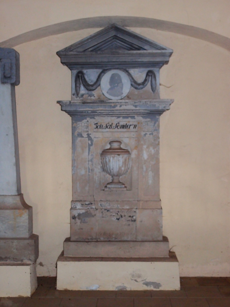 Grab des Theologen Johann Salomo Semler (1725-1791) auf dem Stadtgottesacker, Bogen 53, in Halle/Saale.